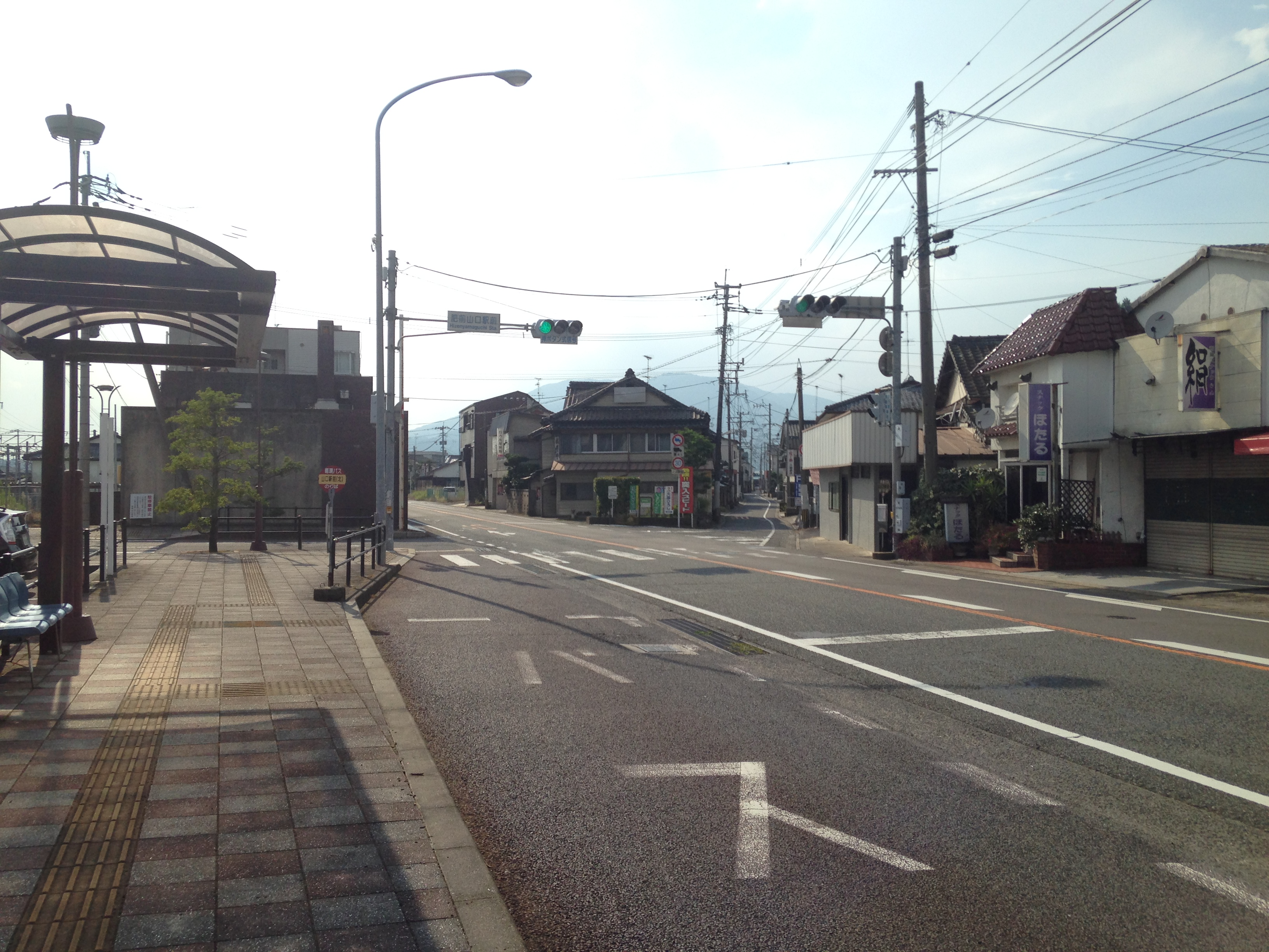 肥前山口駅北口前を通る佐賀県道35号